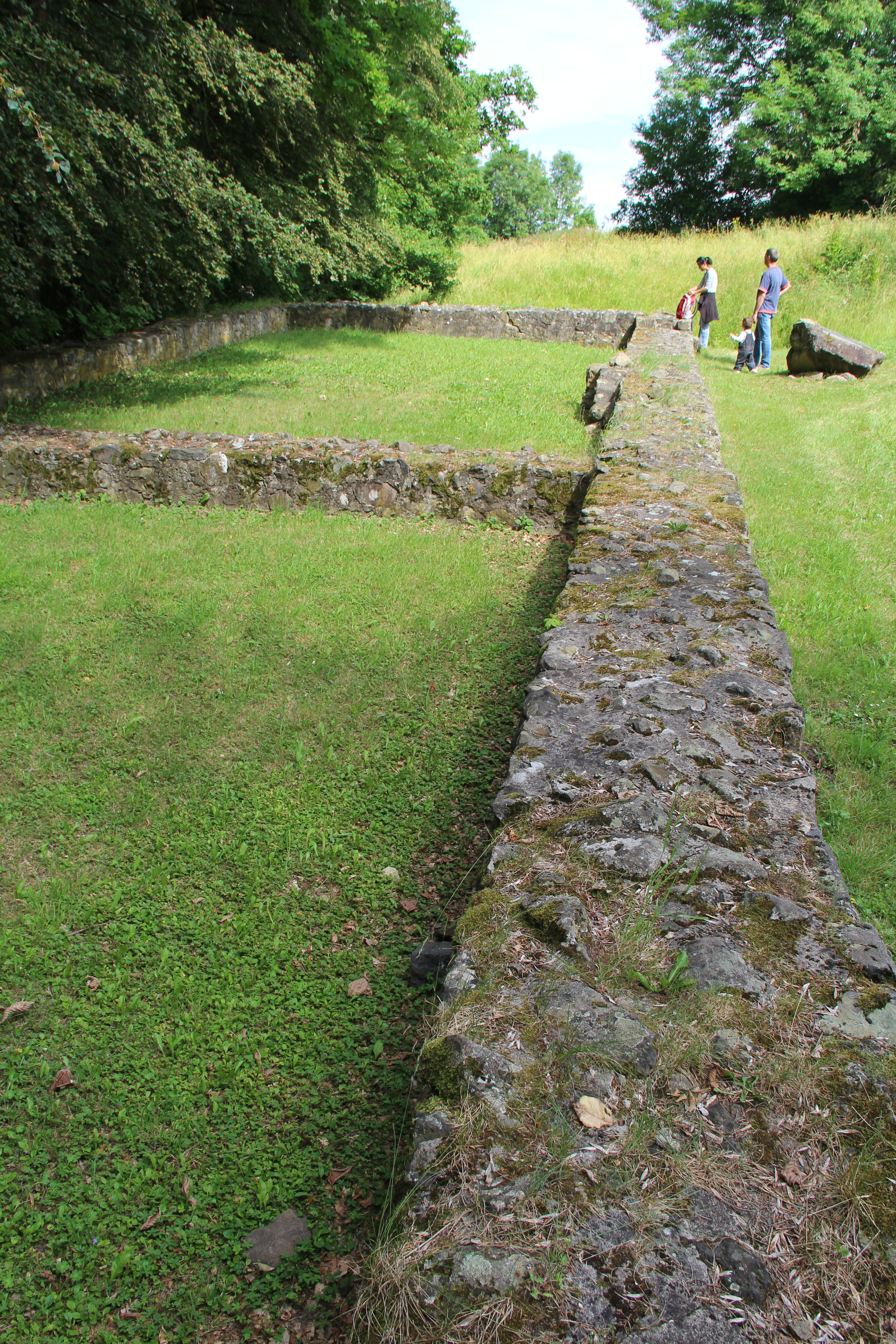 Vorklösterliches Gebäude auf dem Schiffenberg bei Gießen